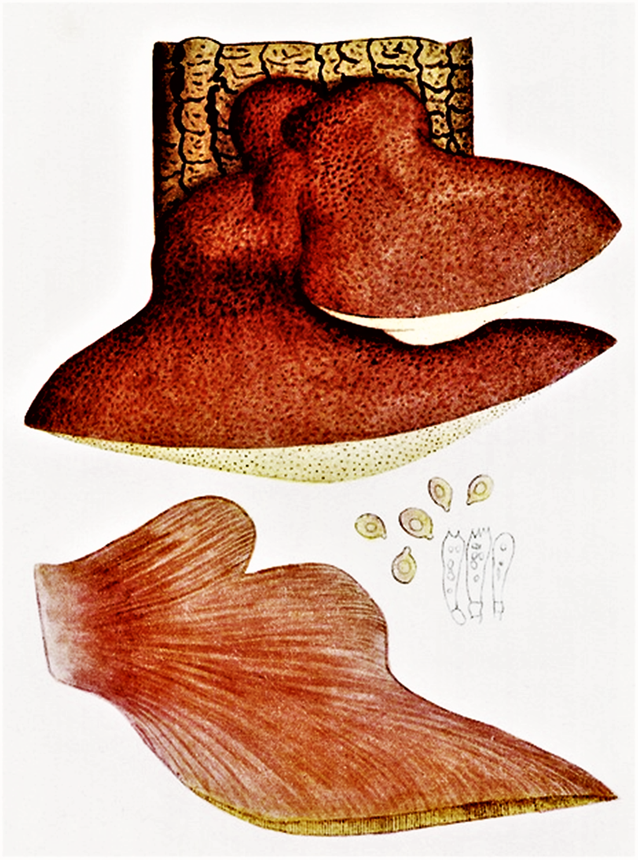 Giacomo Bresadola: Fistulina hepatica (Schaeff., 1774 ex With. (1792)